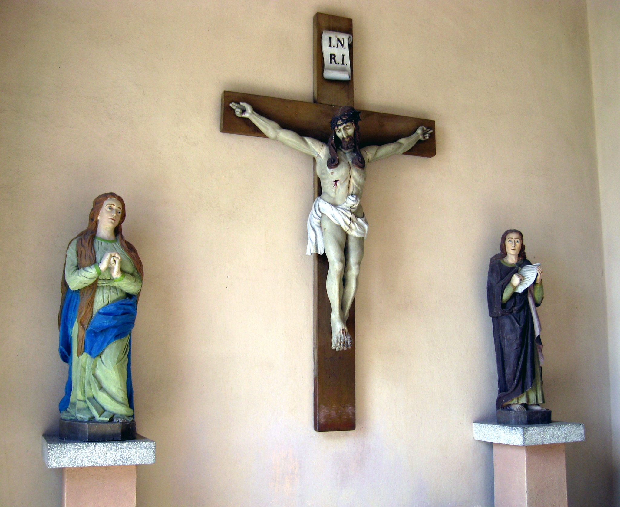 Kościół pw. MB Królowej Różańca Świętego w Iłowie, kruchta kościelna